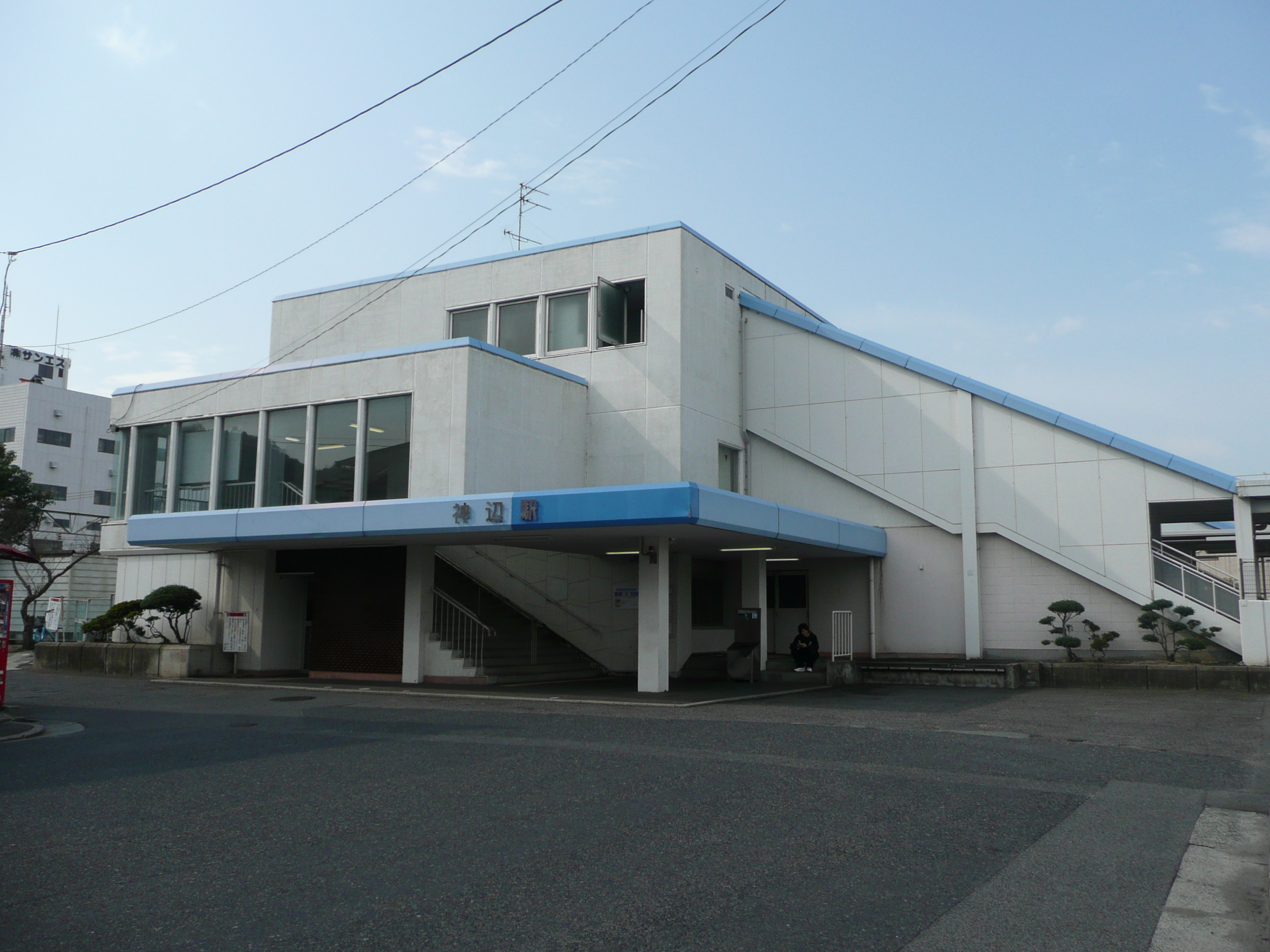 神辺駅の駅舎